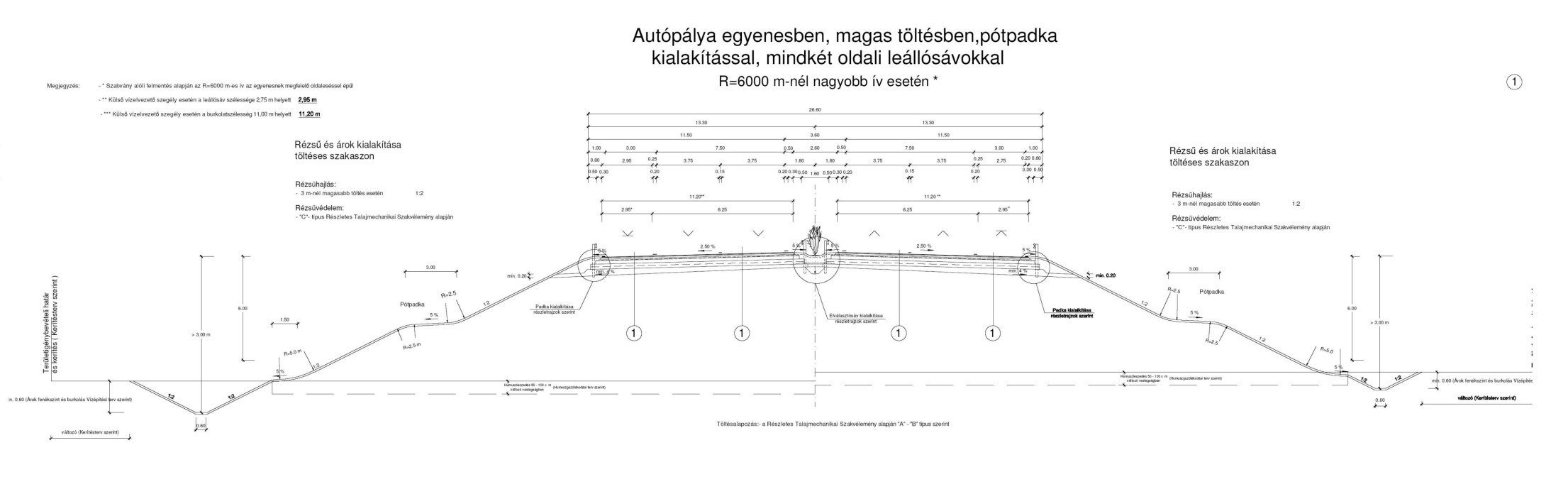 Magyar autópálya keresztmetszet méretek